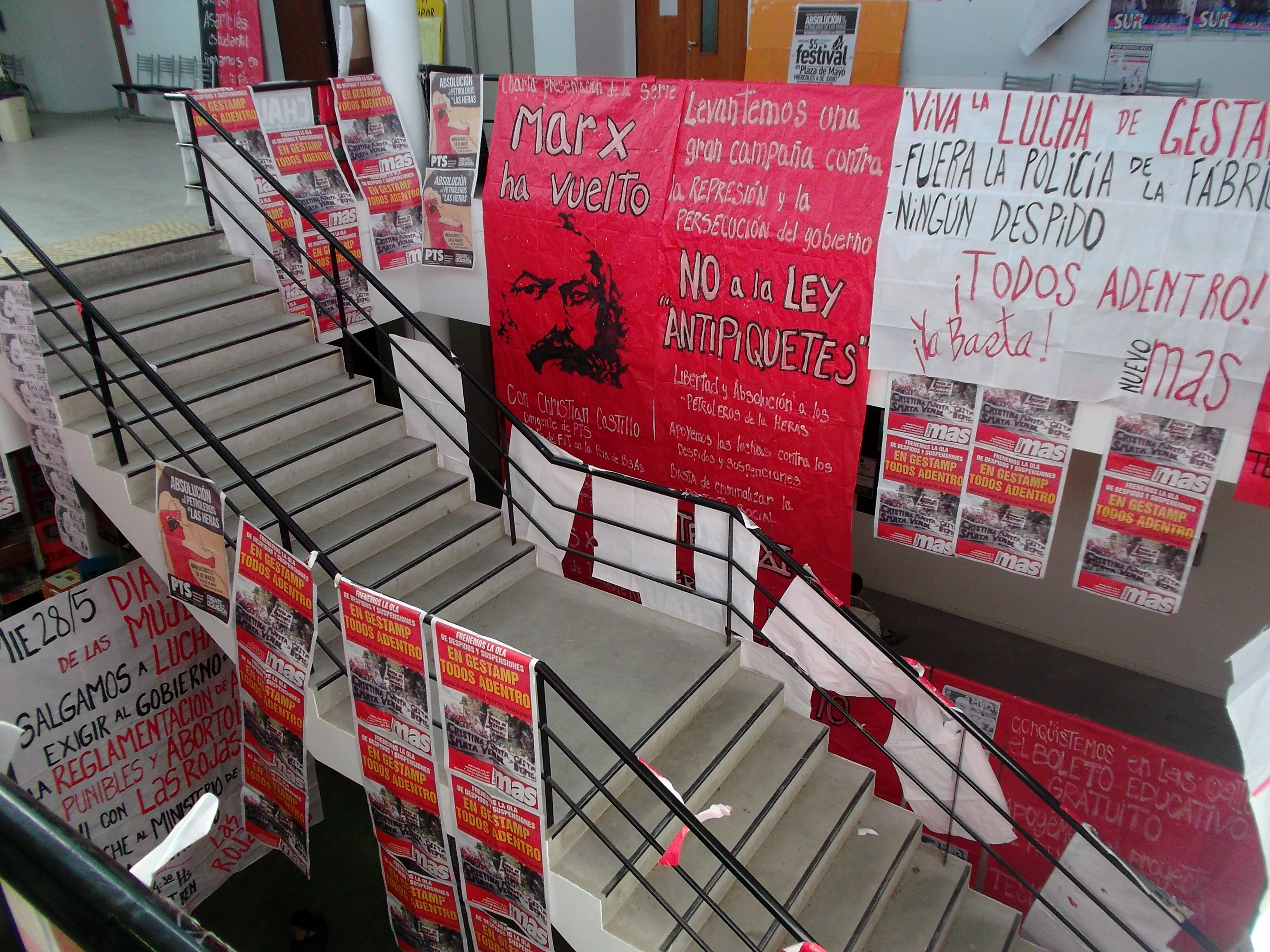 Facultad de Humanidades y Ciencias de la Educación (UNLP). Escalera principal. Fotografía: Eric Hamilton.